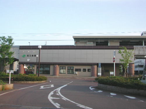 JR北三条駅